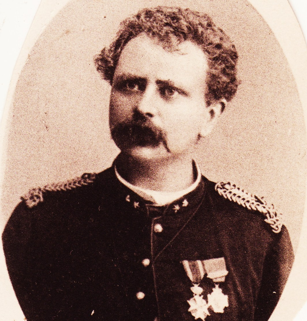 S. Drijber